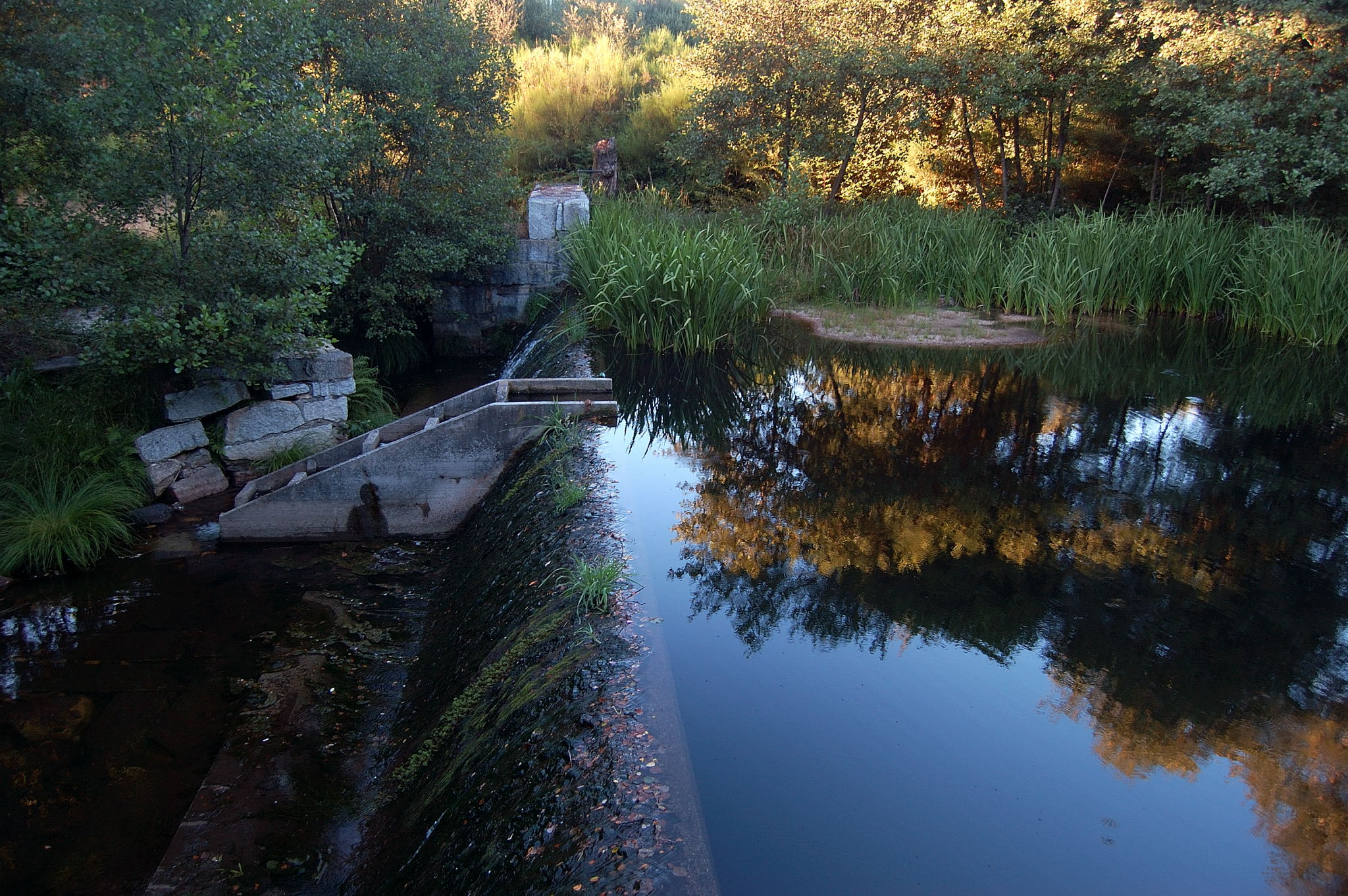 Presa no concello de Verea.